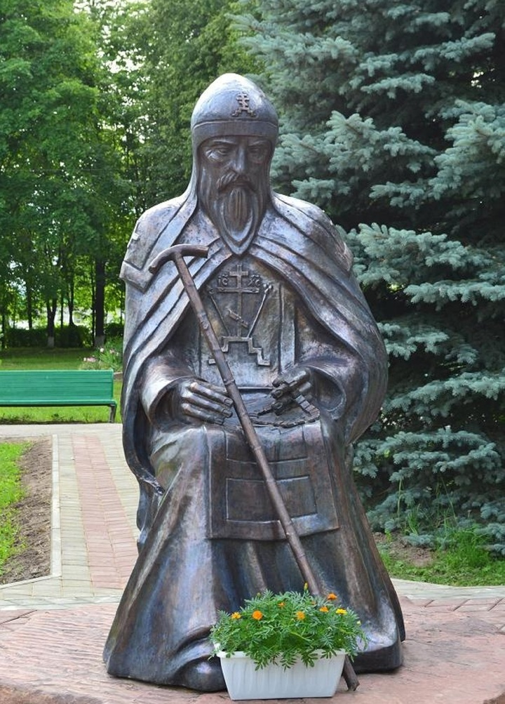 Памятник преподобному Варнаве Ветлужскому в р.п. Варнавино